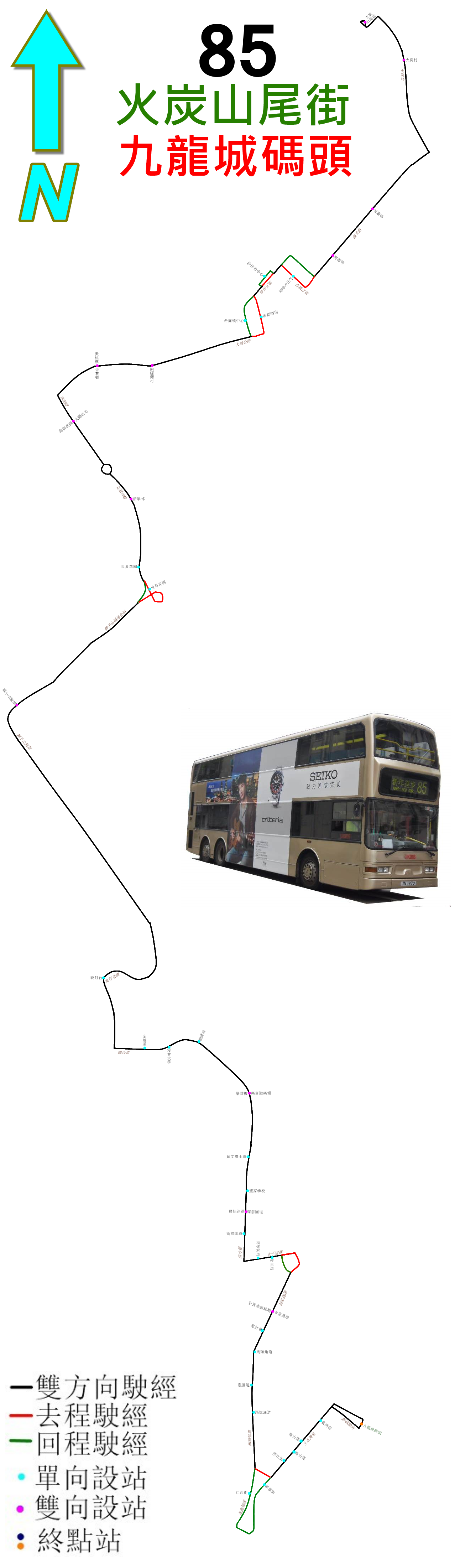 中文（香港）: 九巴85線的走線圖